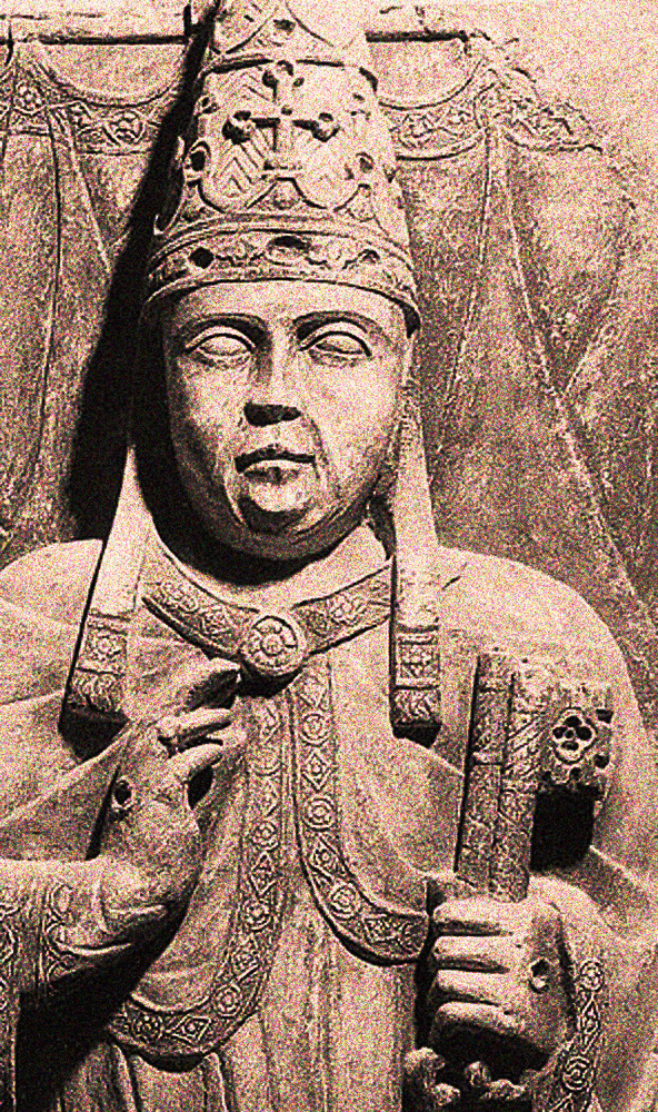 Benoît XII Paolo de Siena 1341 crypte de St Pierre de Rome